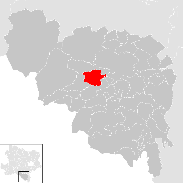 Bezirk Neunkirchen